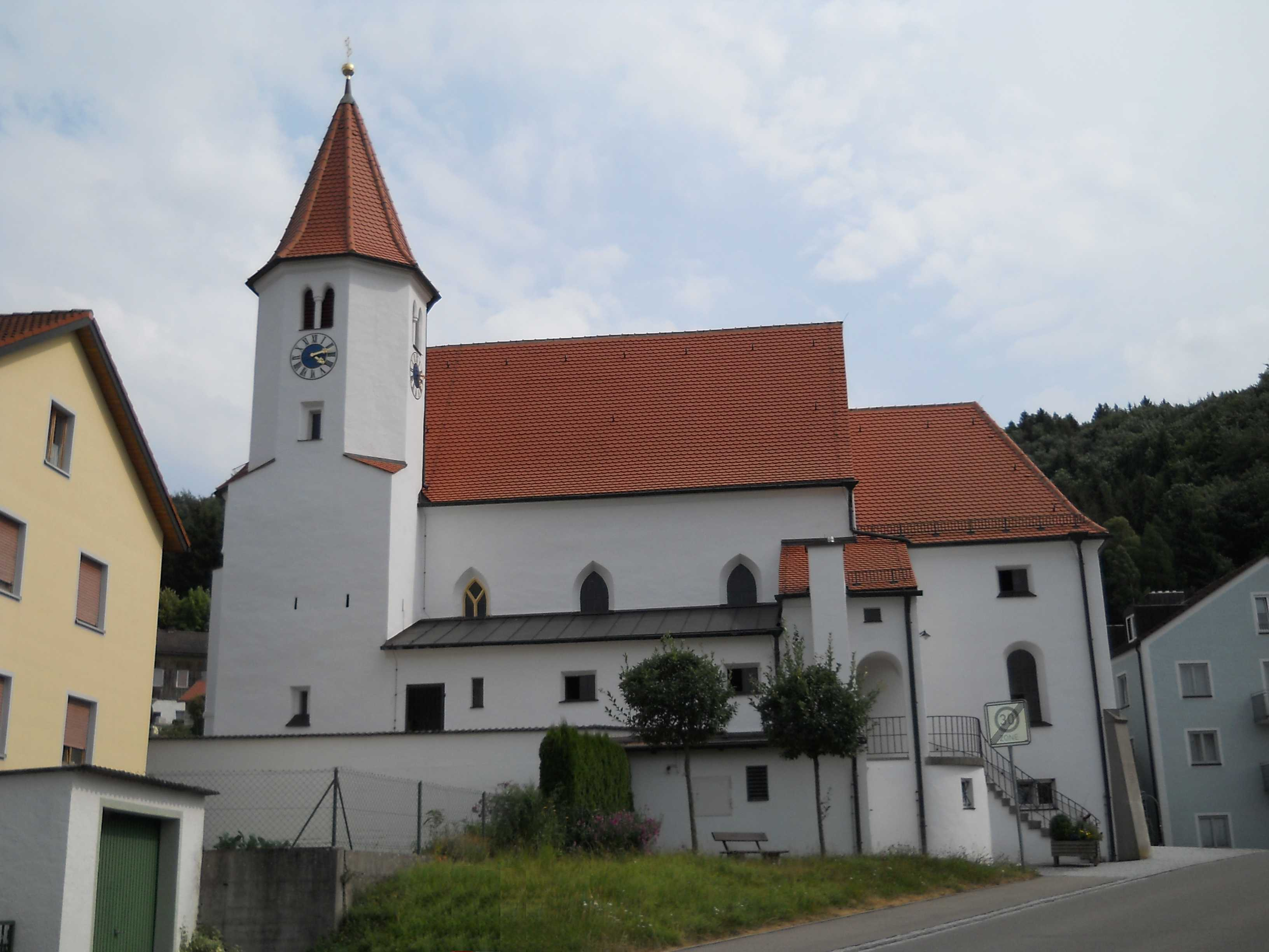 Wasserzell, Ortsteil von Eichstätt (Oberbayern), Kirche zur hl. Maria und zu den hl. 14 Nothelfern